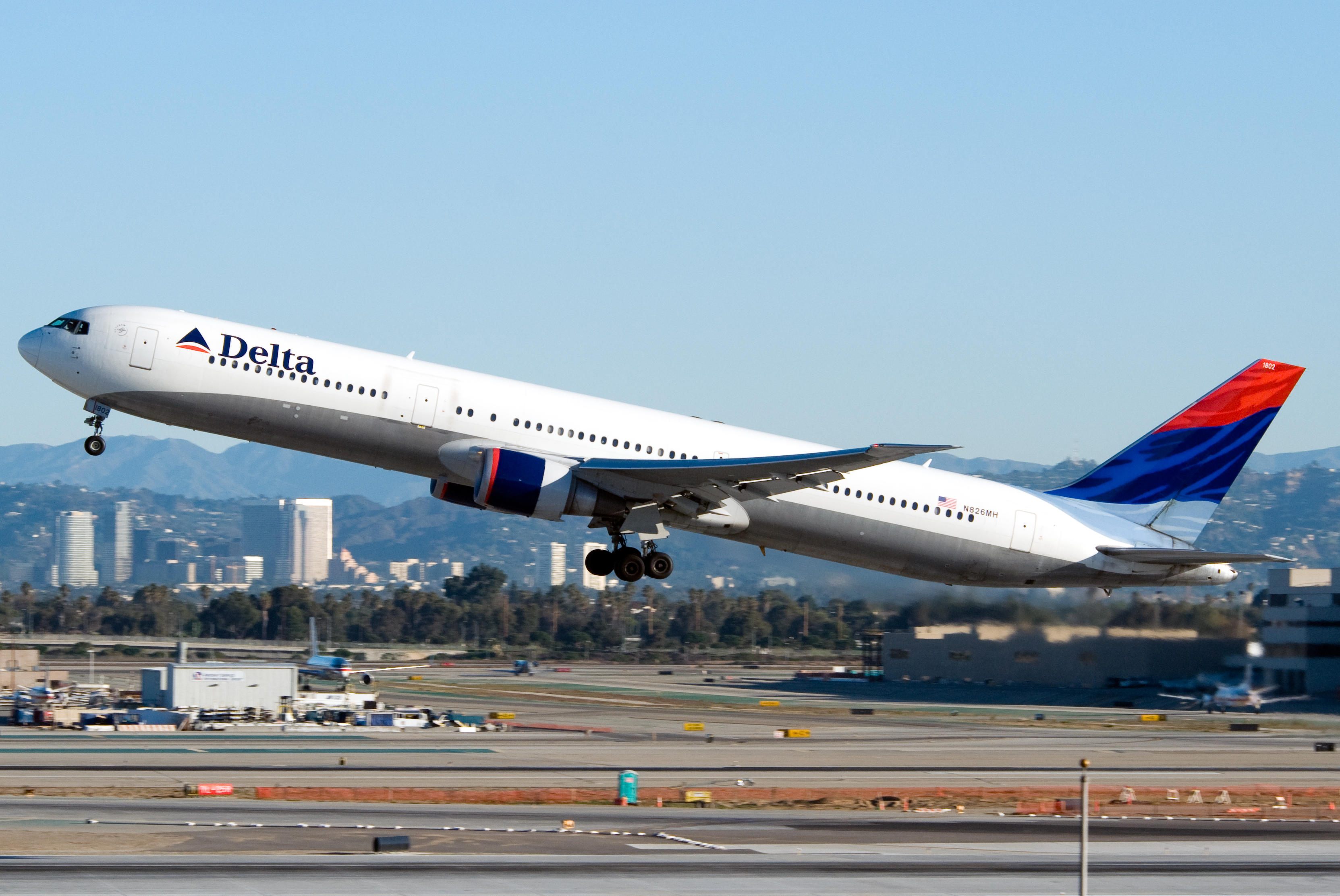 DL 767-400